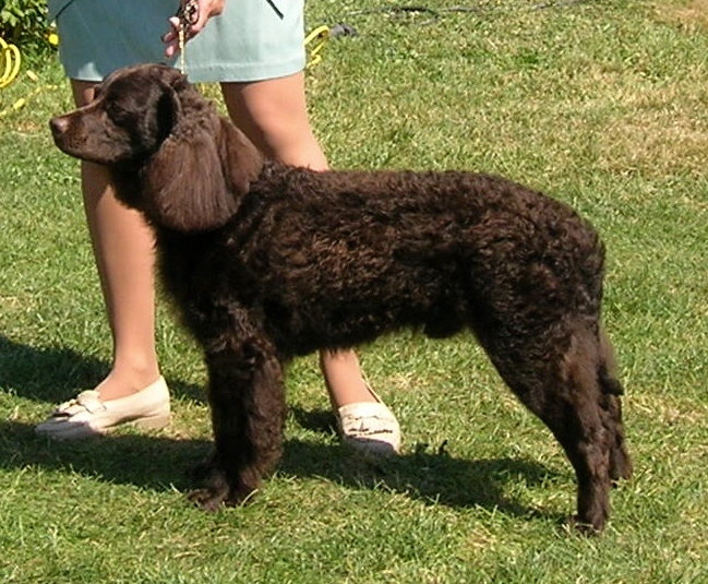 chien d'eau americain